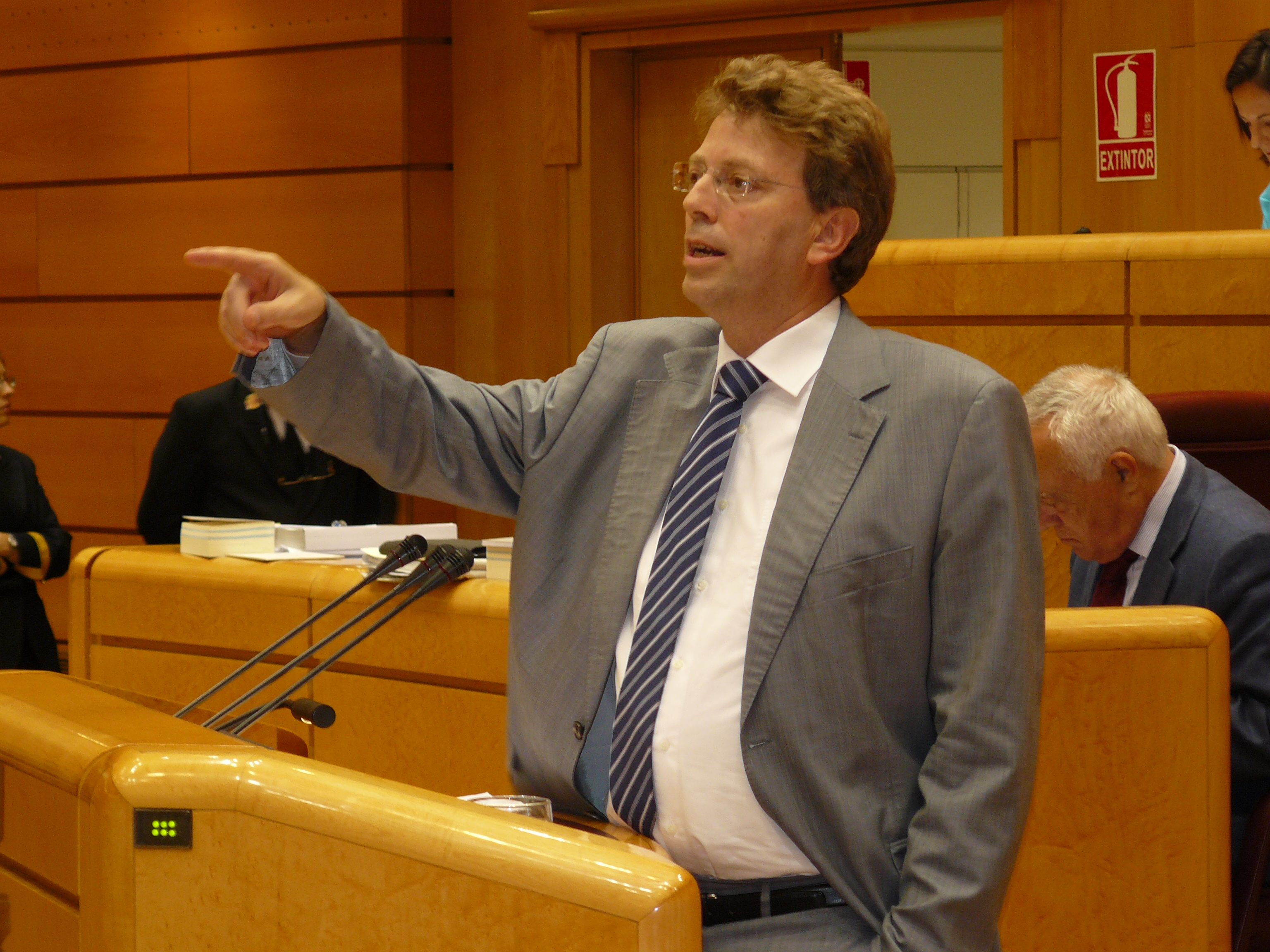 Ferran Bel a l'hemicicle.20.06.12.